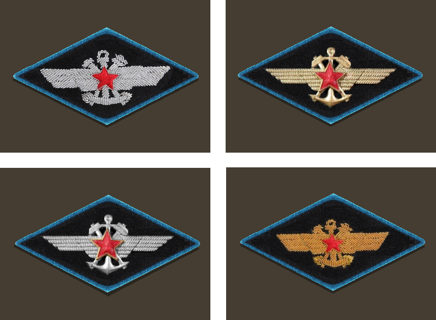 нарукавный знак ВОСО 1951